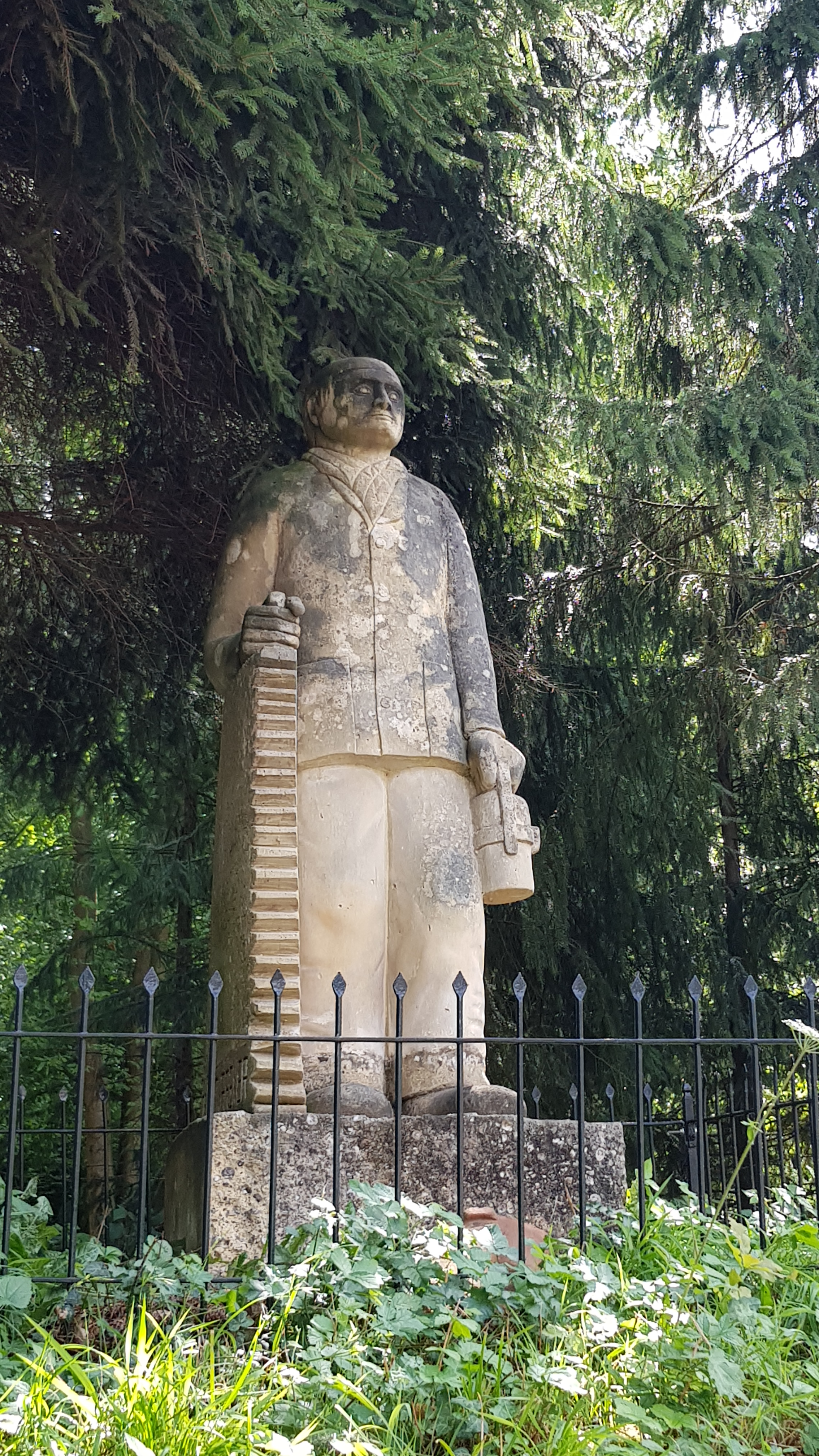 De Blokbreker bij de ingang van de Geulhemmergroeve, Geulhem, Nederland